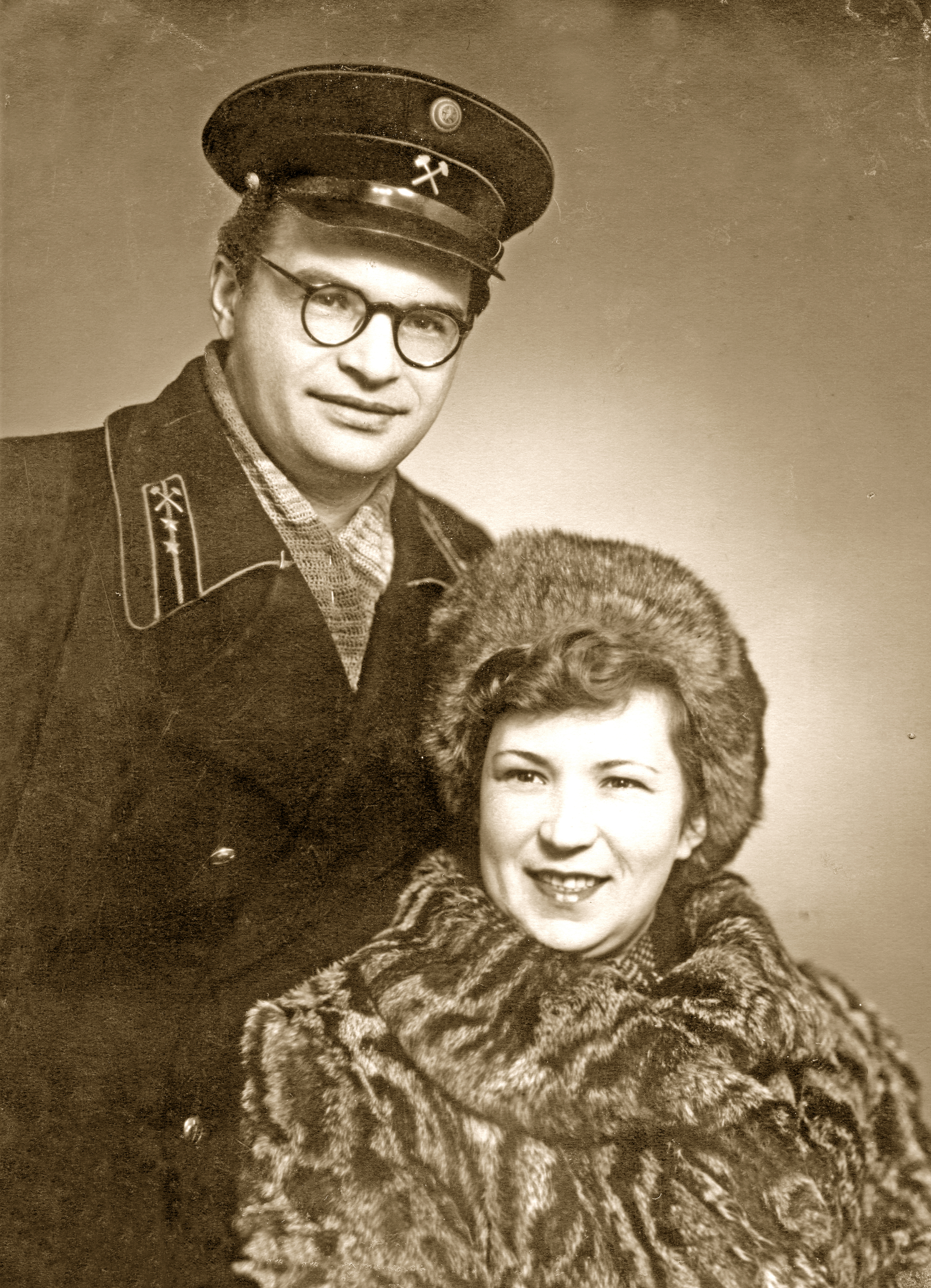 Славоросовы